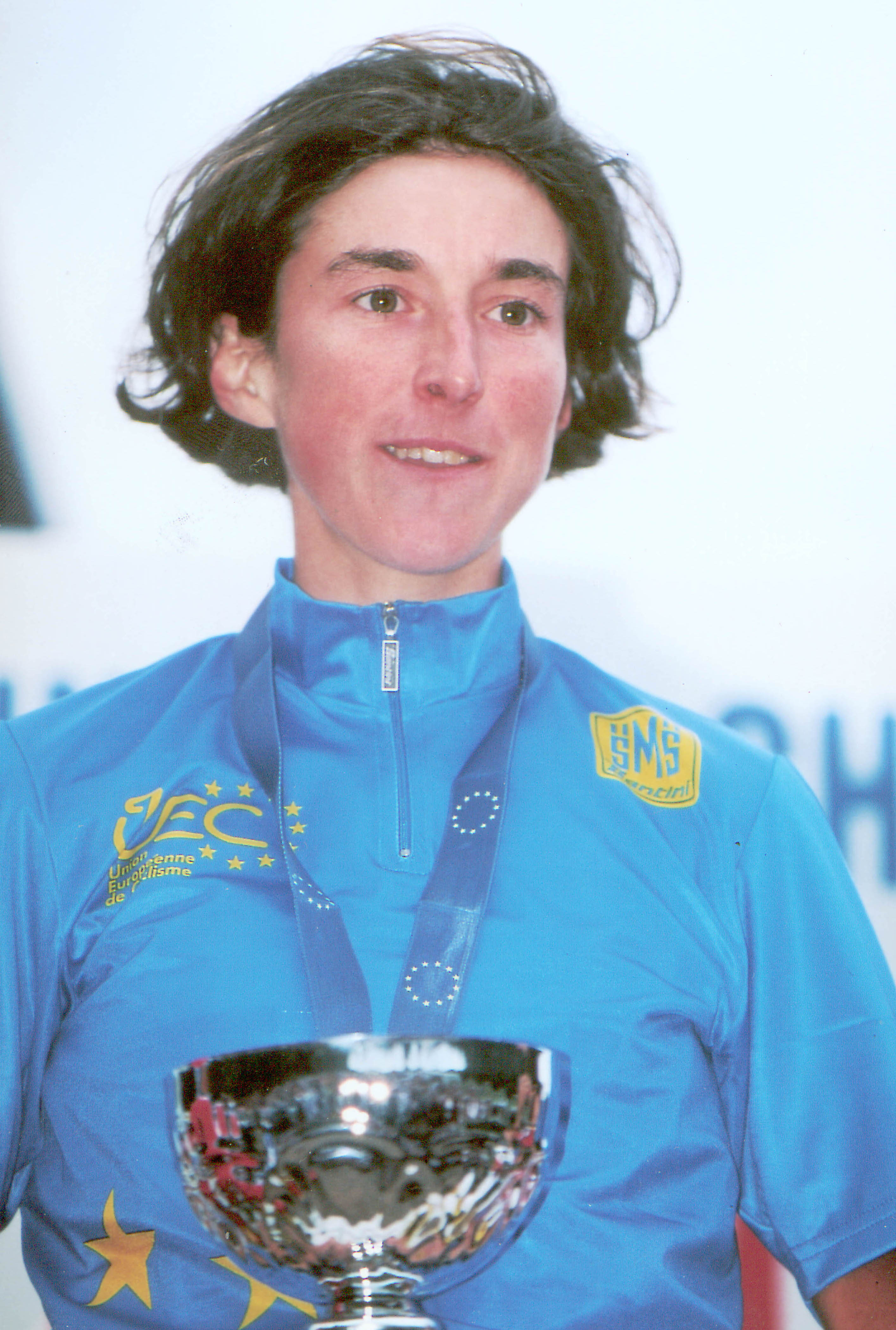 Laurence Leboucher championne d'Europe de VTT 1998.